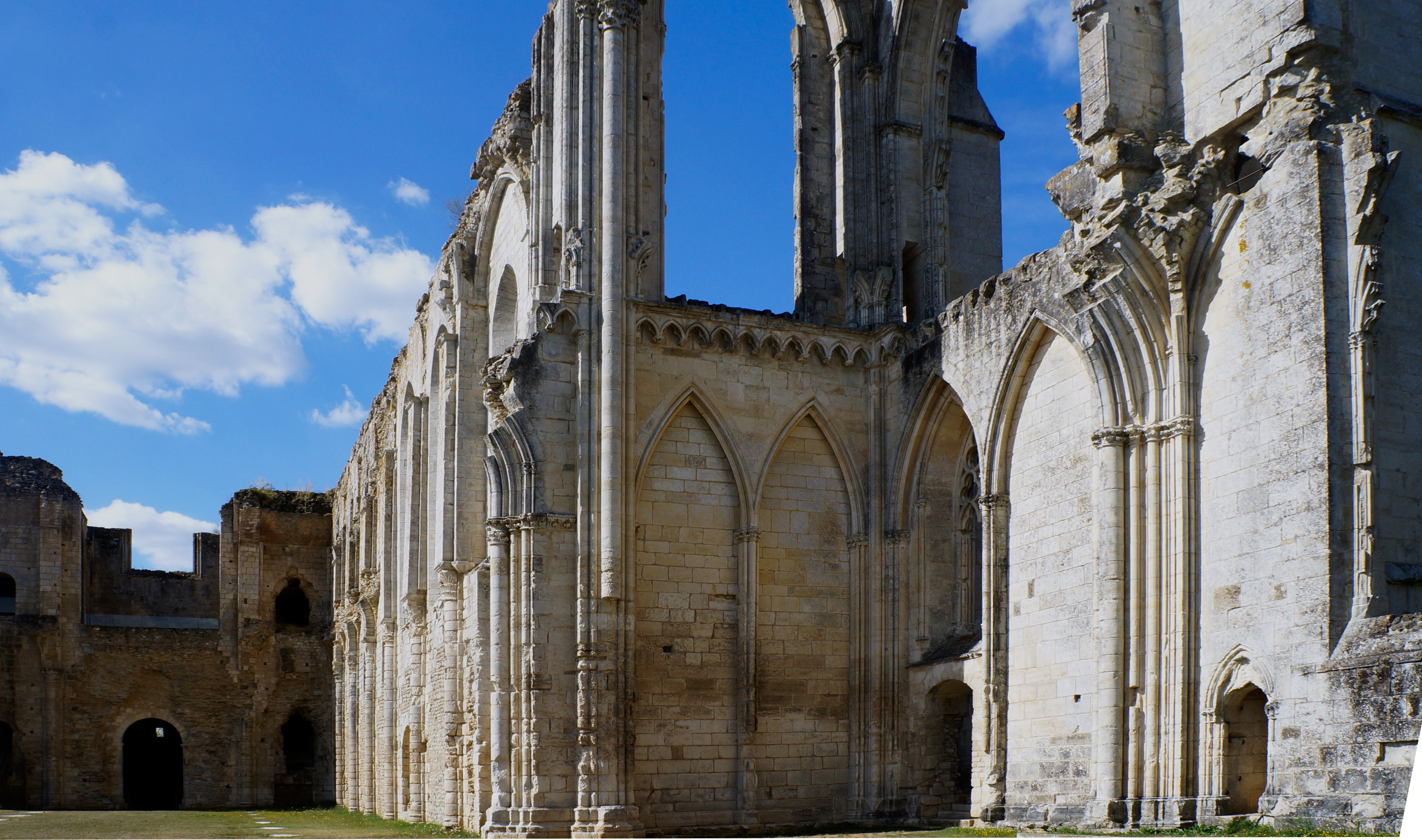 Cathédrale Saint-Pierre de Maillezais Vendée Pays de la Loire.- France .